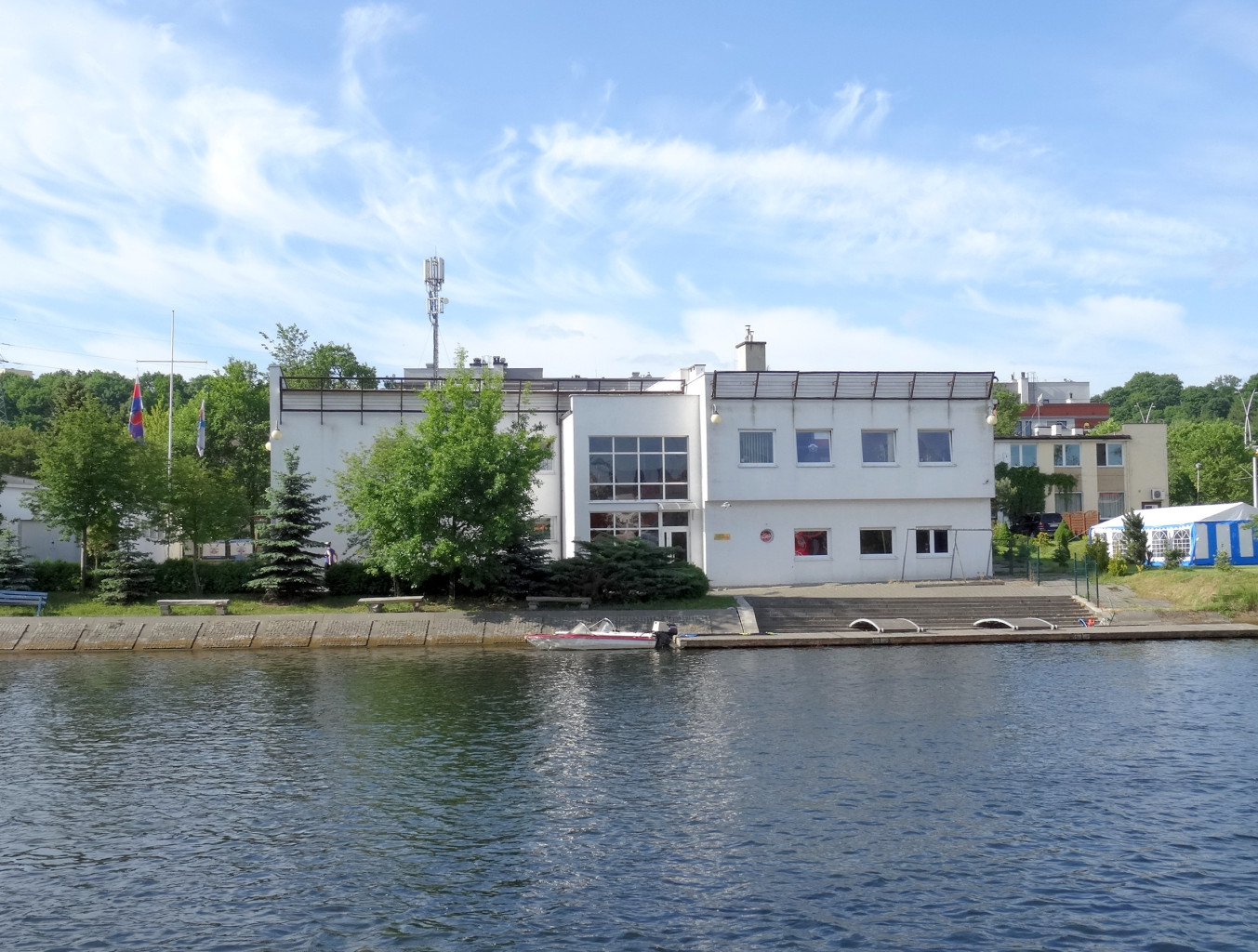 Przystań Bydgoskiego Towarzystwa Wioślarskiego na rzece Brdzie w Bydgoszczy